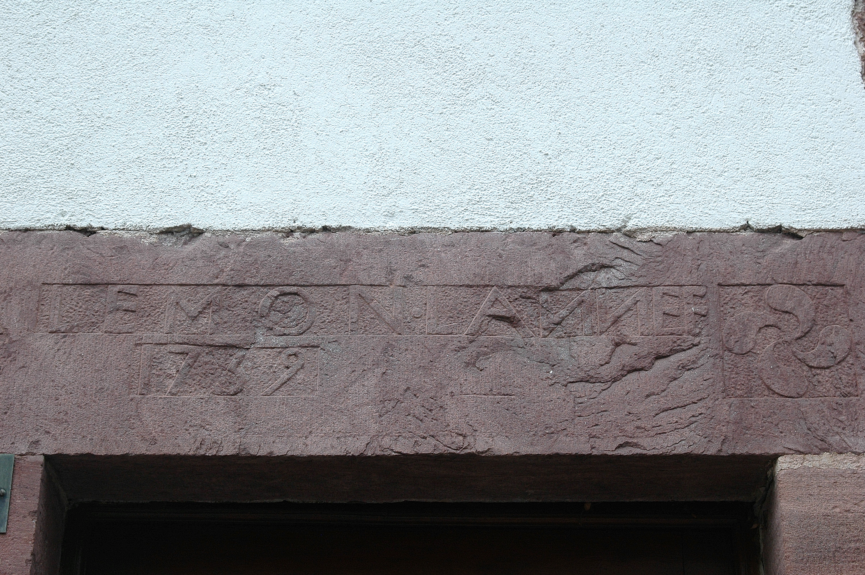 Saint-Jean-Pied-de-Port, détail du linteau d'une maison. Photo prise le 13/07/06 par Harrieta171